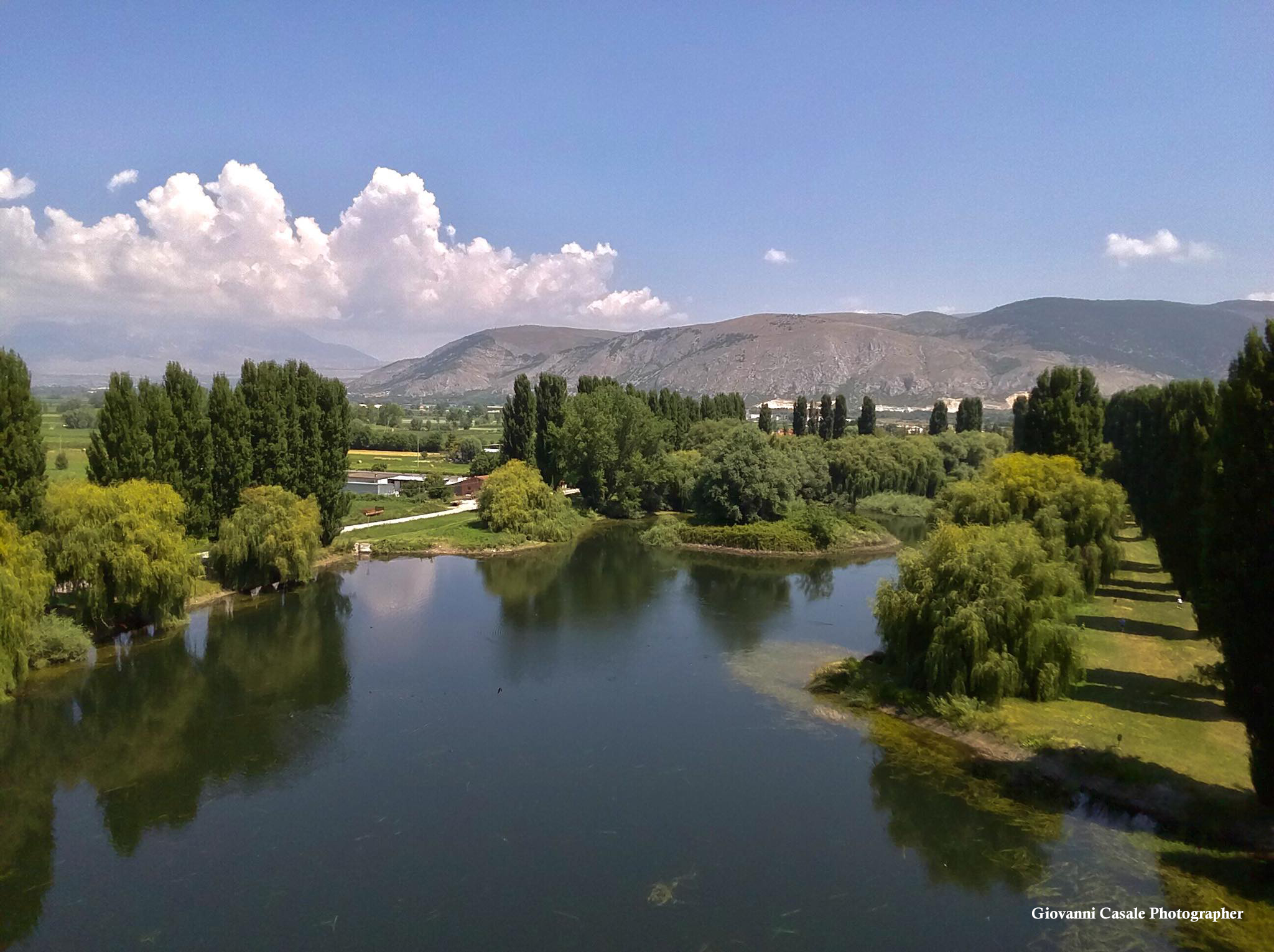 Lake of Ortucchio